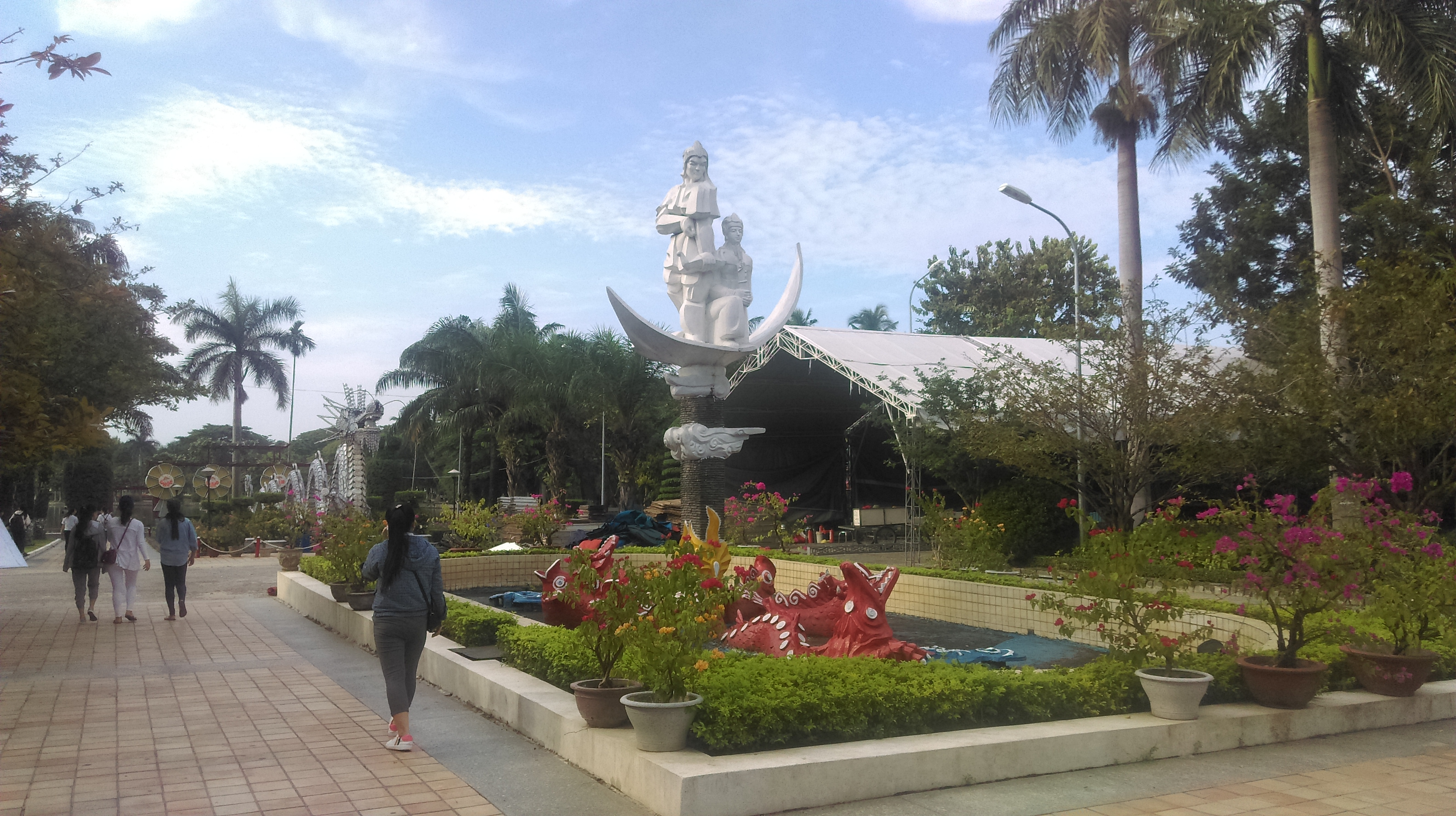 Công viên 29 tháng 3, Đà Nẵng